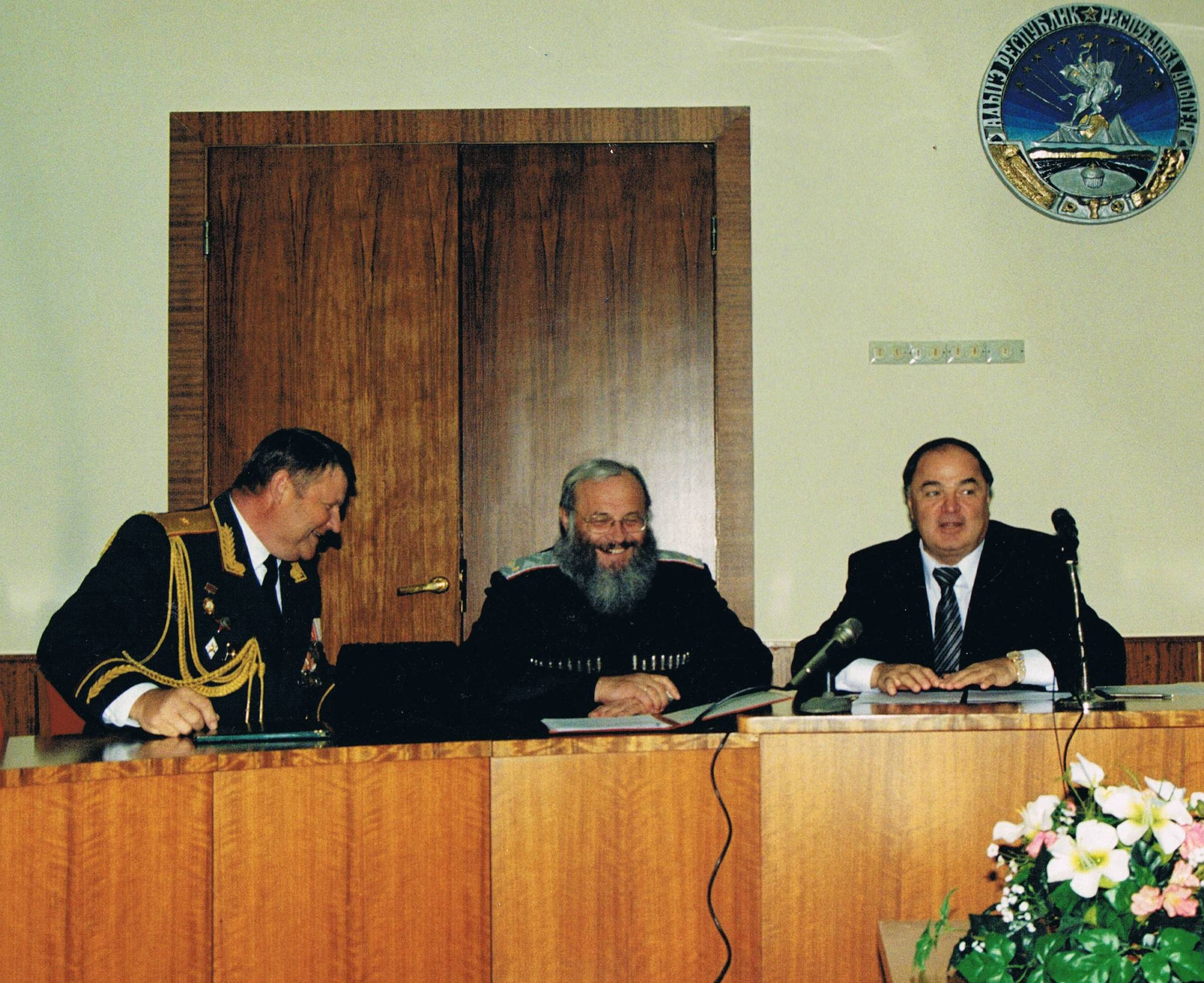 Генерал-майор Дорофеев А.А., казачий генерал Громов В.П. и Президент Адыгеи Совмен Х.М. Майкоп